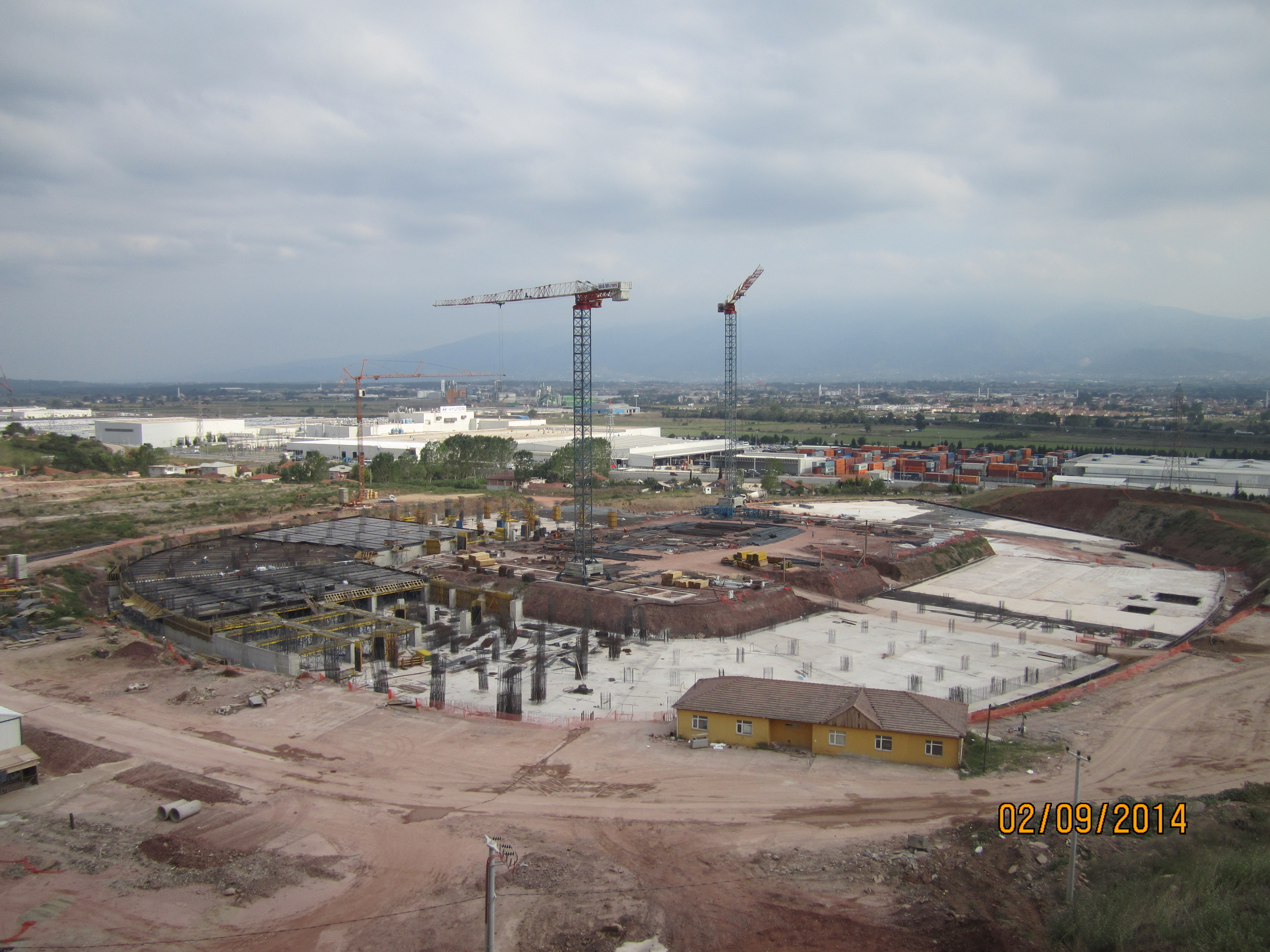 Kocaeli Arena 2014 September